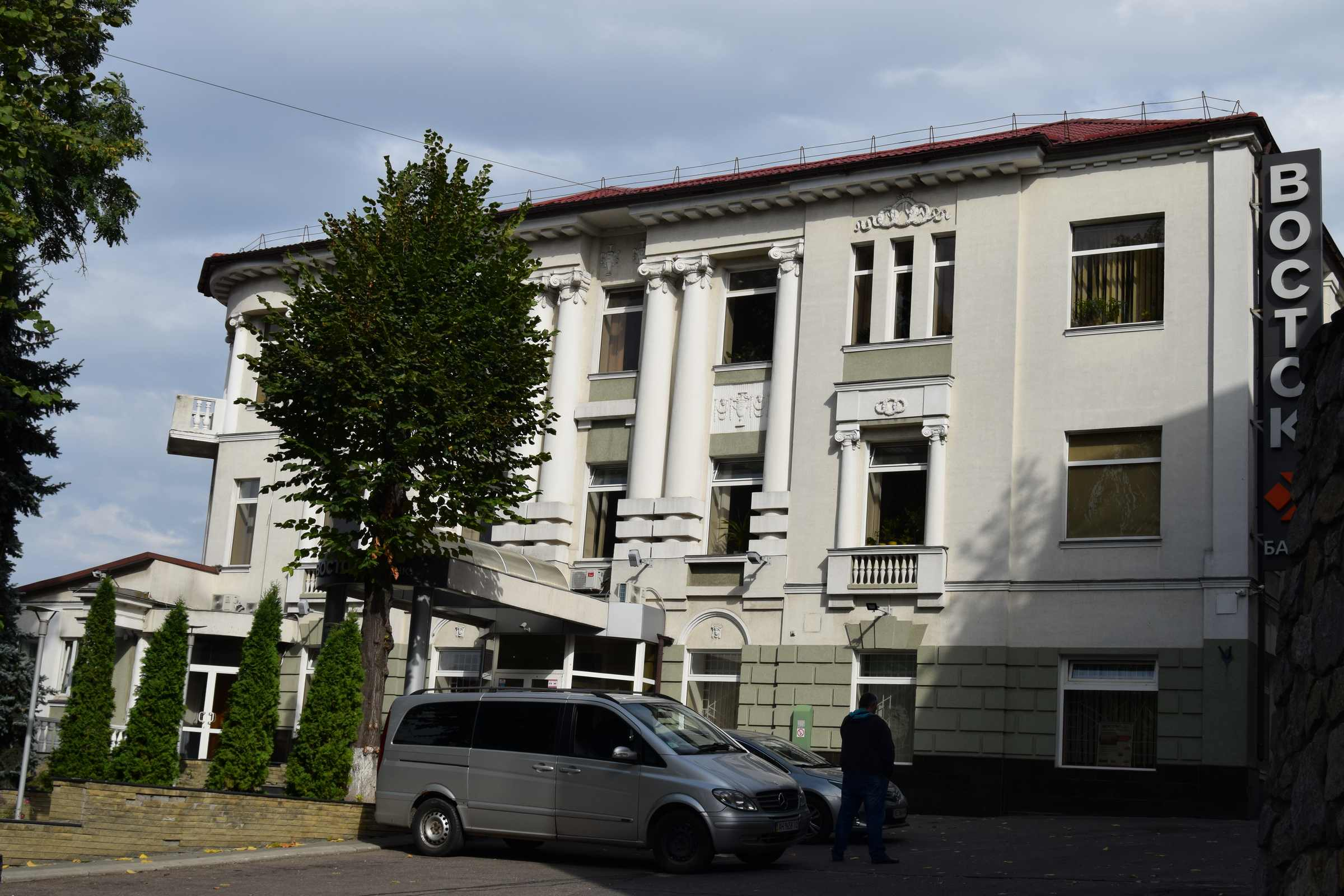 Доходний будинок типу «Мебльовані кімнати», Дніпро, узв. Крутогірний, 12